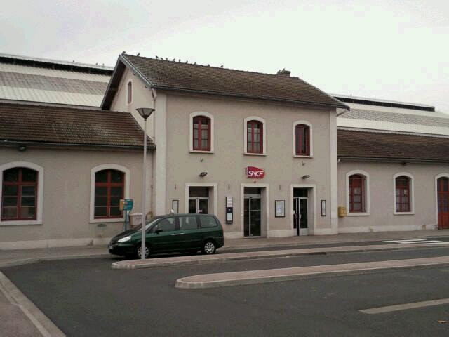 Gare_de Saint-Germain-des-Fossés, France